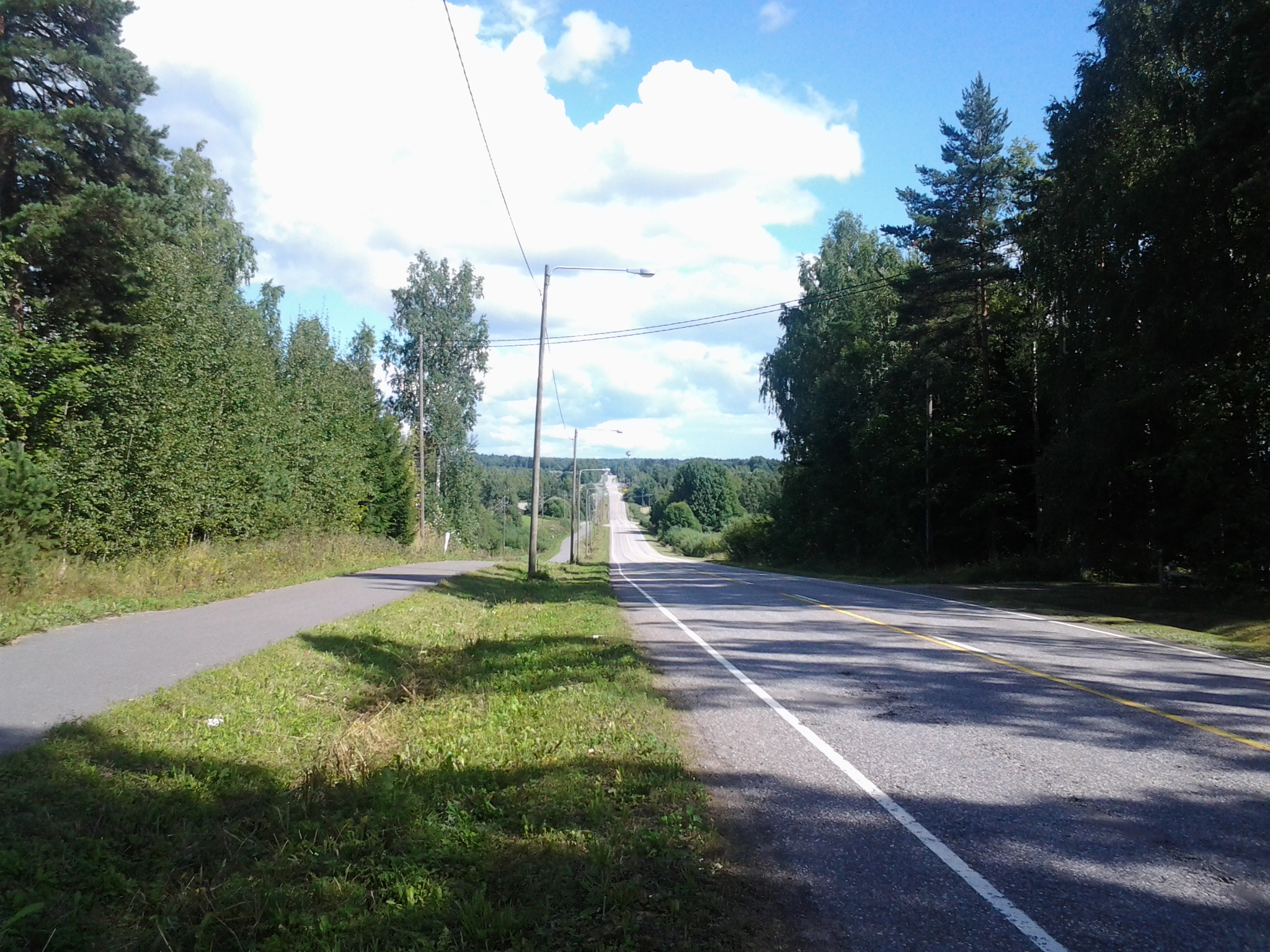 Yhdystie 2955 Hollolassa.